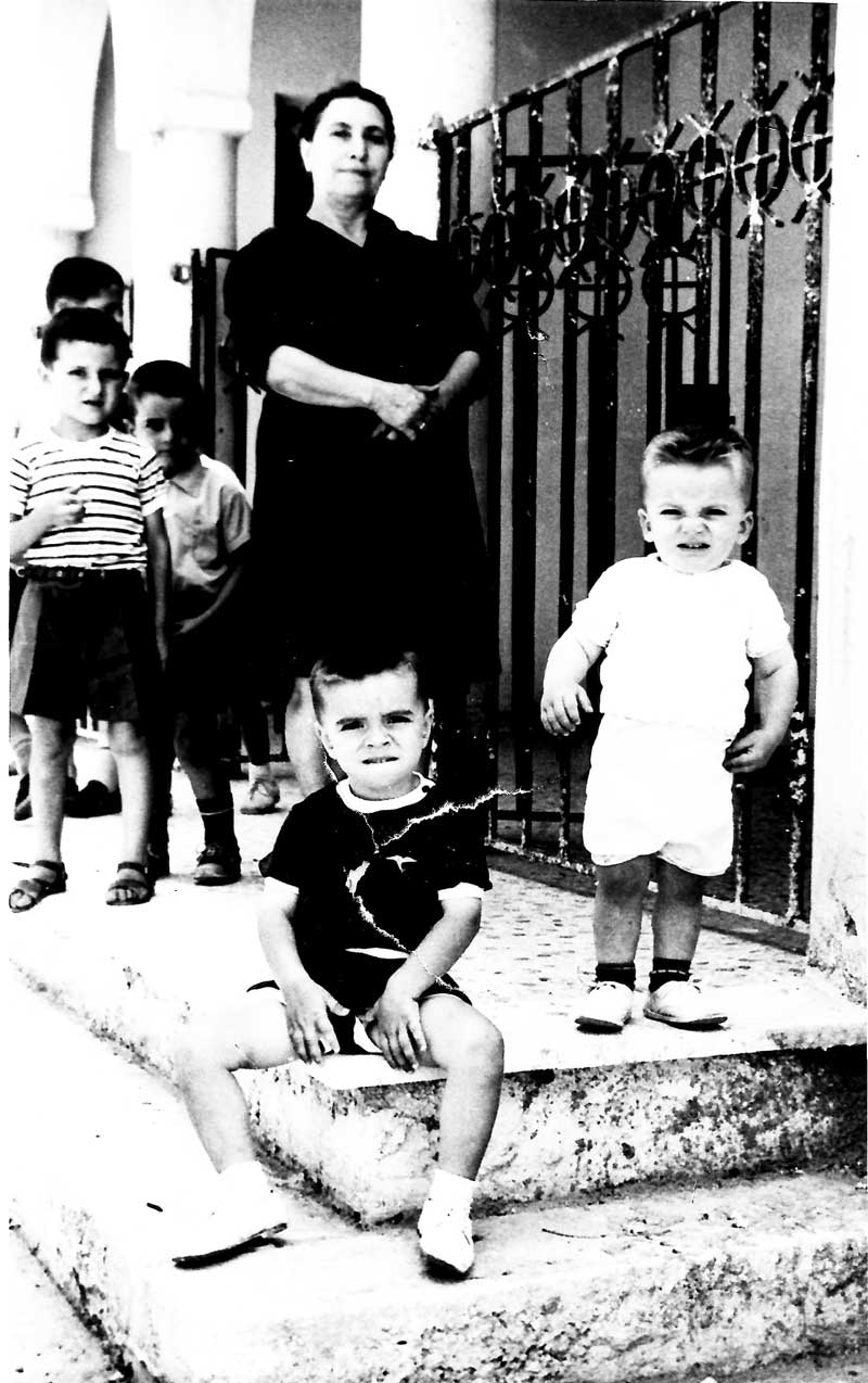 1969..Νήπια με την γιαγιά τους.